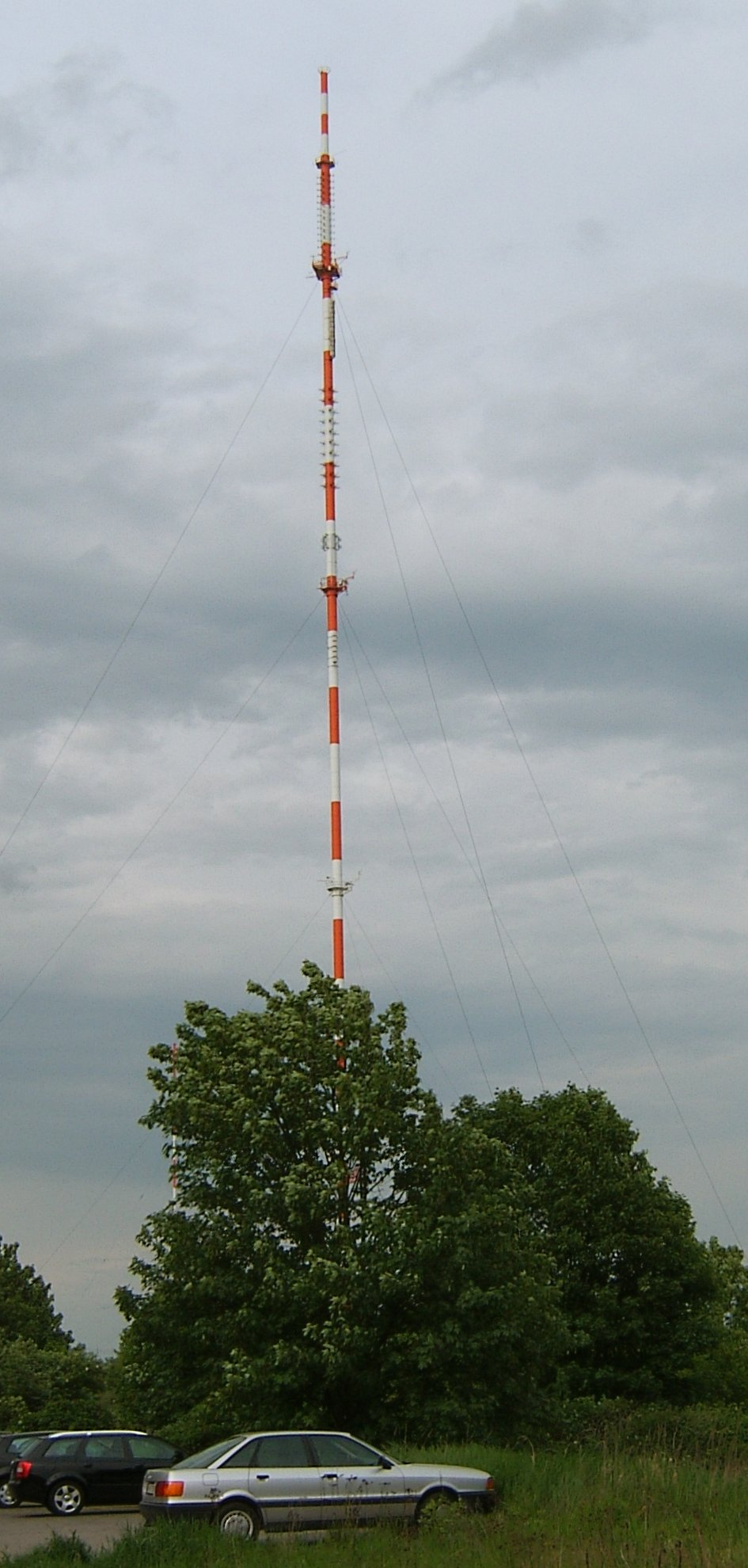 Hamburg, Billwerder, Sendemast (Aufnahmestandort: Kreuzung Unterer Landweg/Alter Landweg)